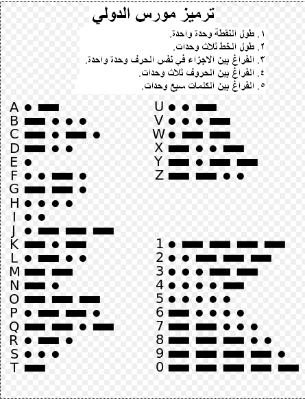 نسخ_أخرى